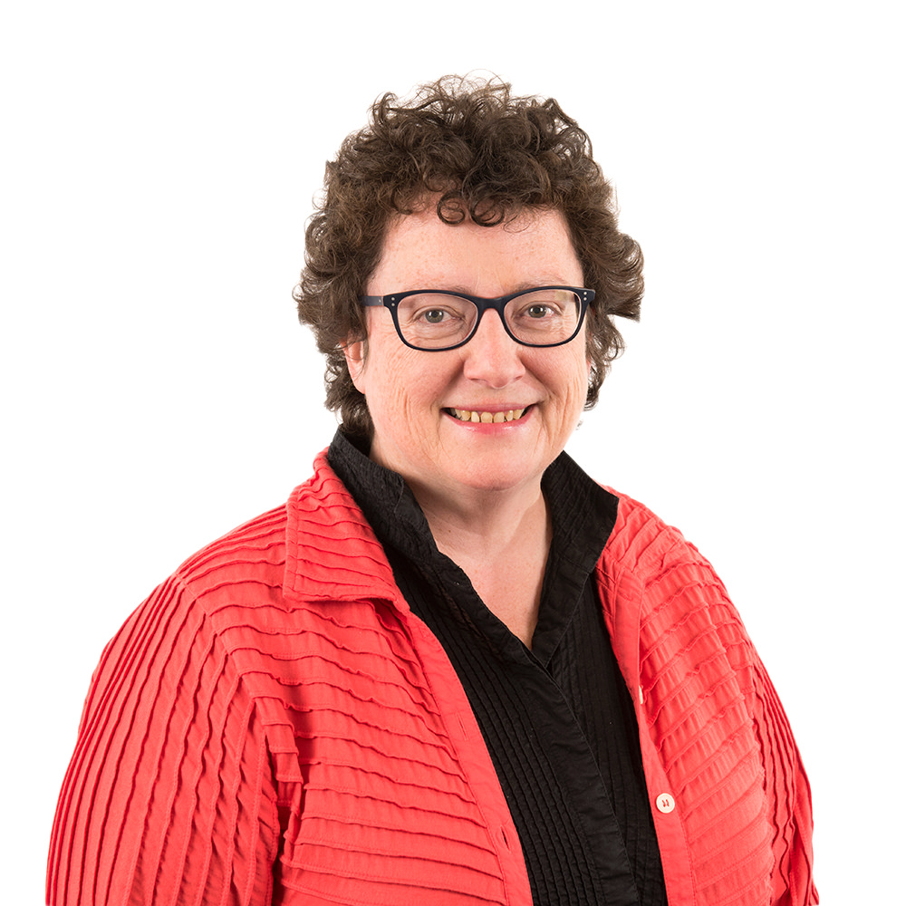 Plaid: Plaid Cymru Etholaeth: Ceredigion Party: Plaid Cymru Constituency: Ceredigion